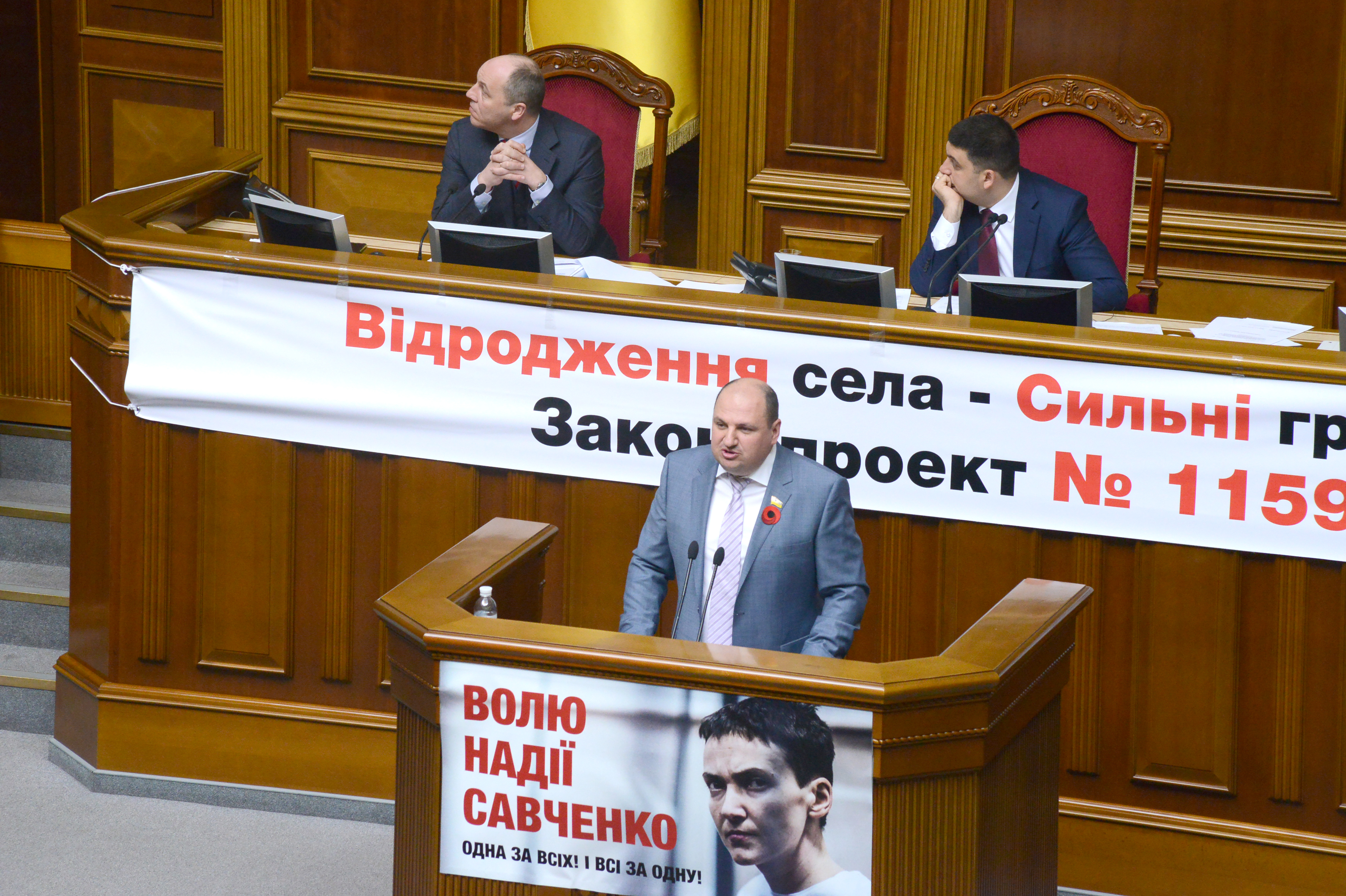 ВЕРХОВНА РАДА УКРАЇНИ 2015 фотограф Вадим Чуприна